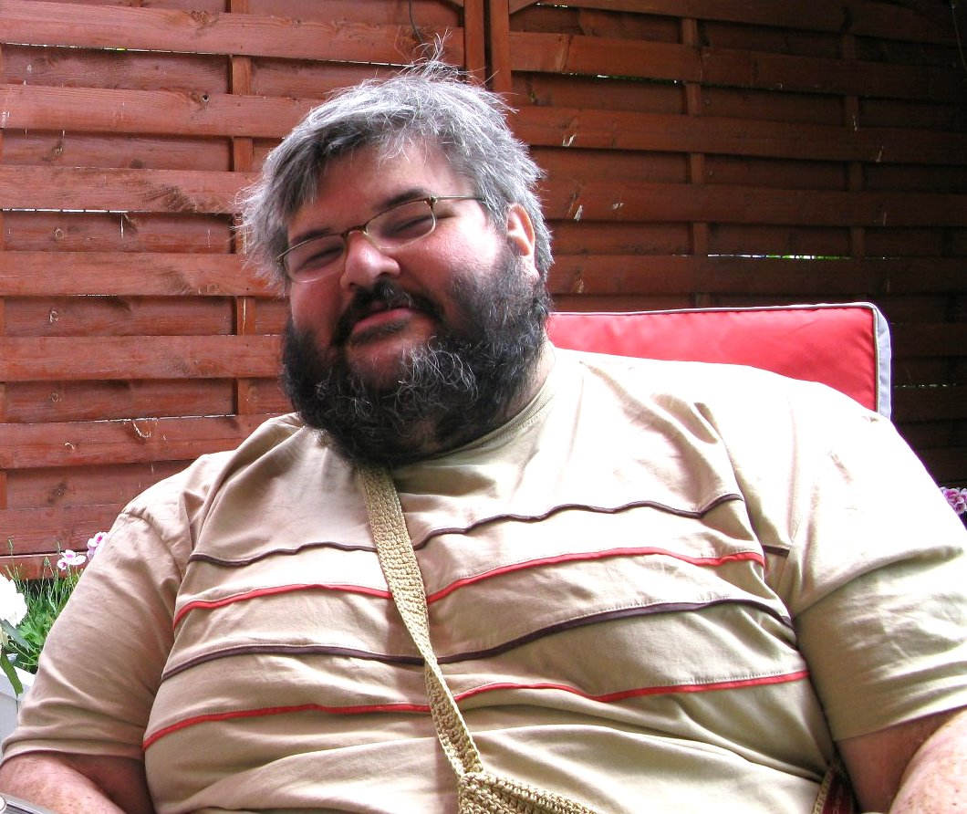 Fotografia Borisa Gerusa